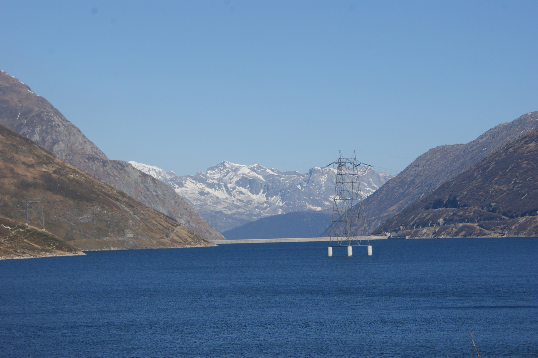 Lai da Sontga Maria, Lukmanier – Blick nach Norden